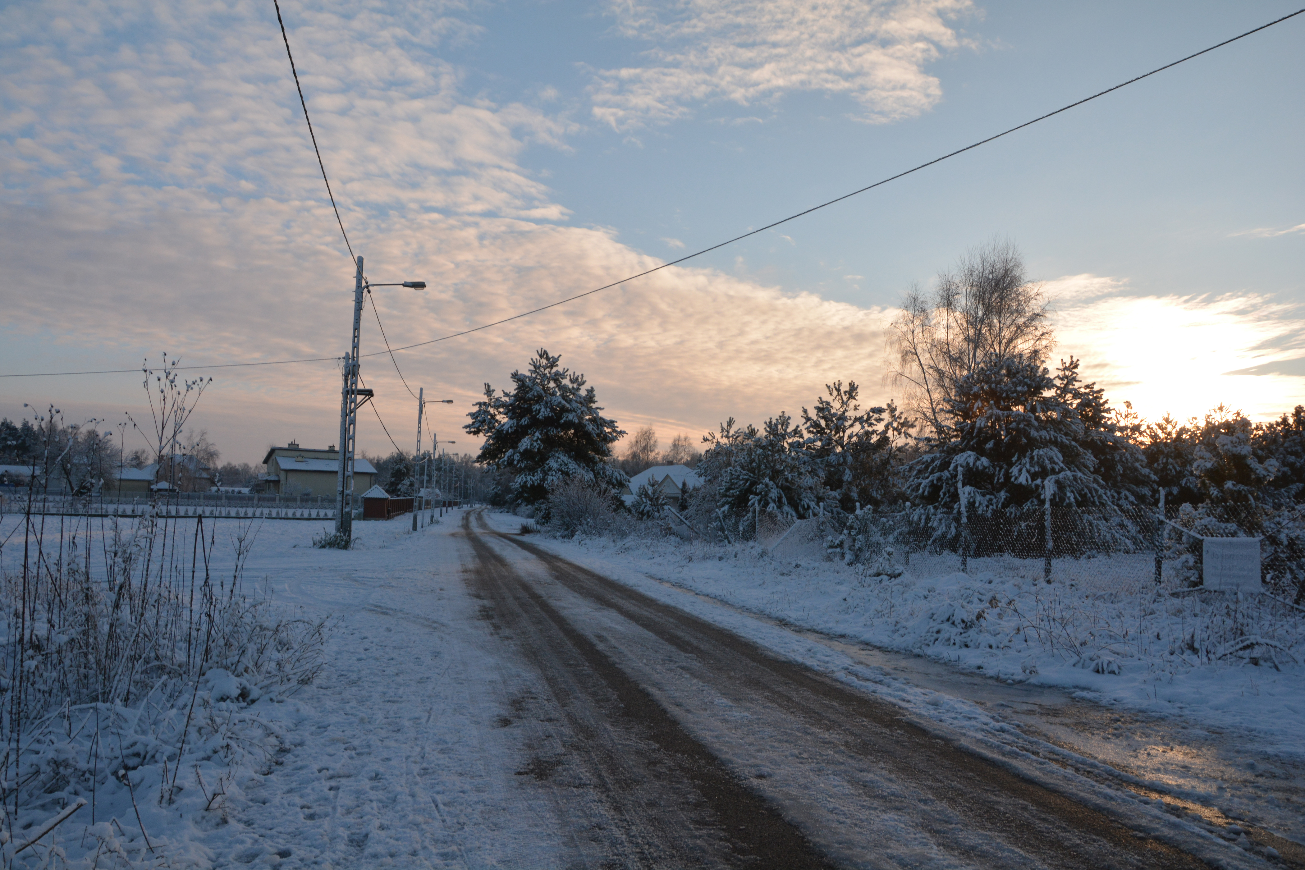 Osiedle Szamocin przy ulicy Orneckiej zimowym popołudniem